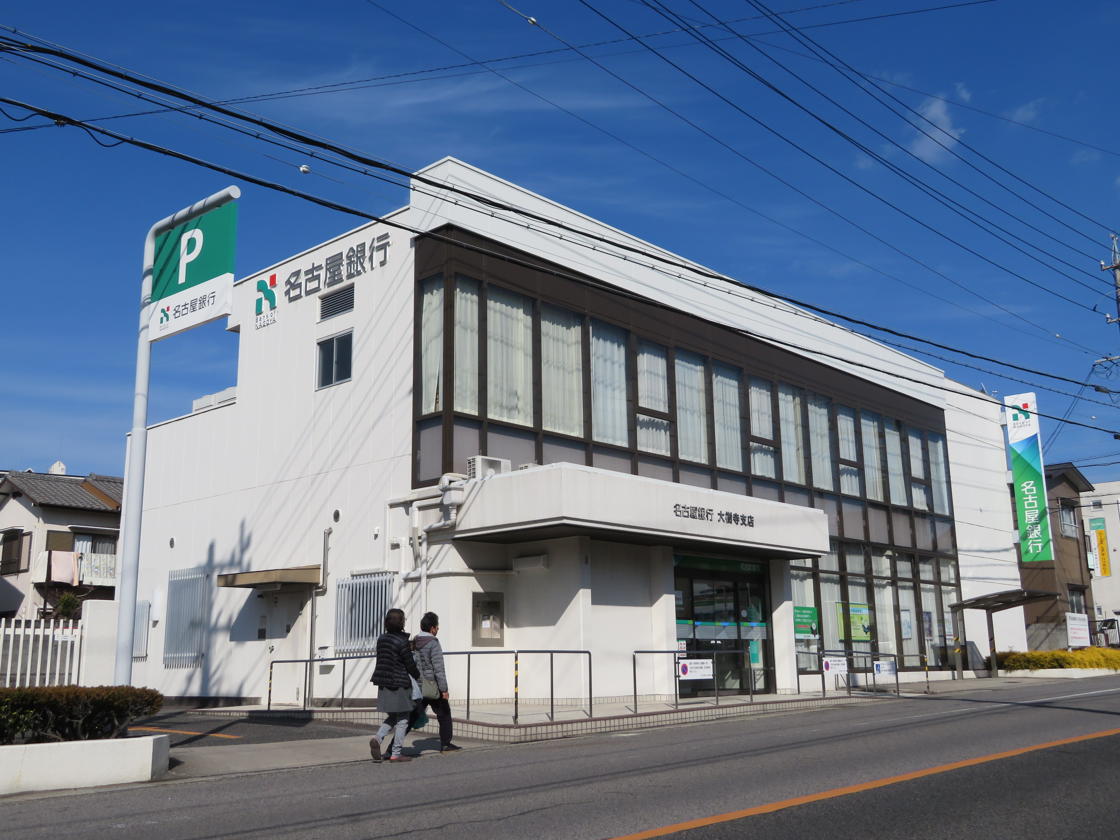 名古屋銀行 大樹寺支店（愛知県岡崎市）